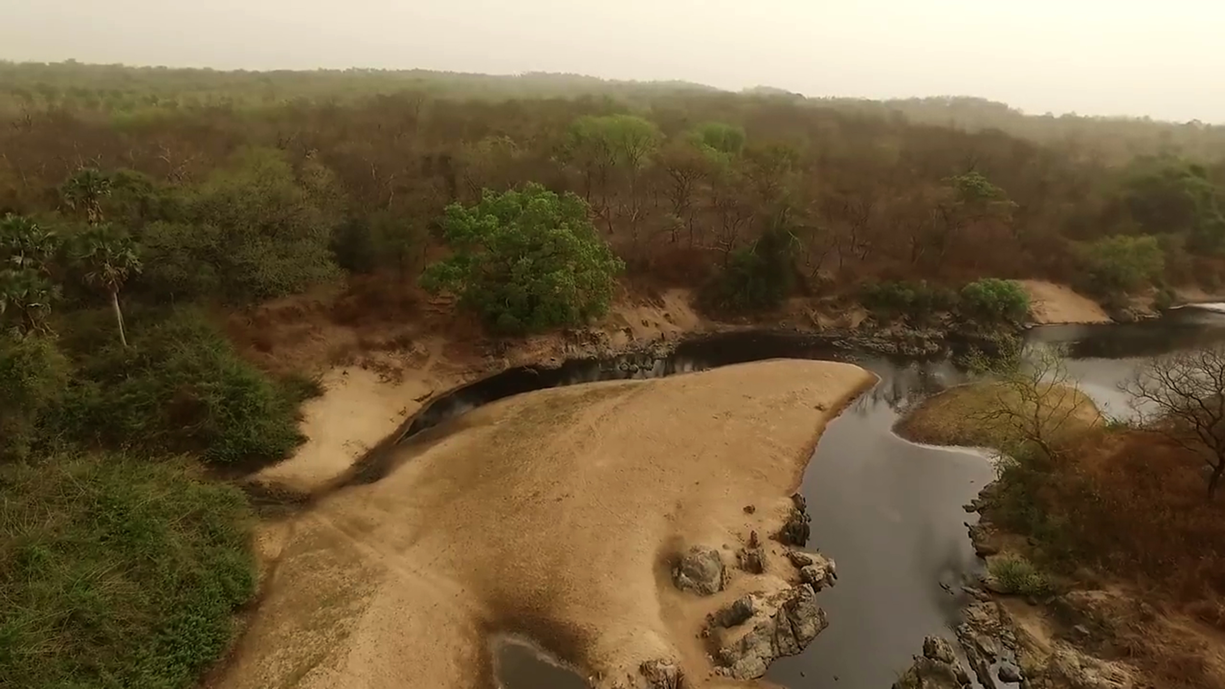 Le parc national de la Benoué est situé dans la région du Nord Cameroun